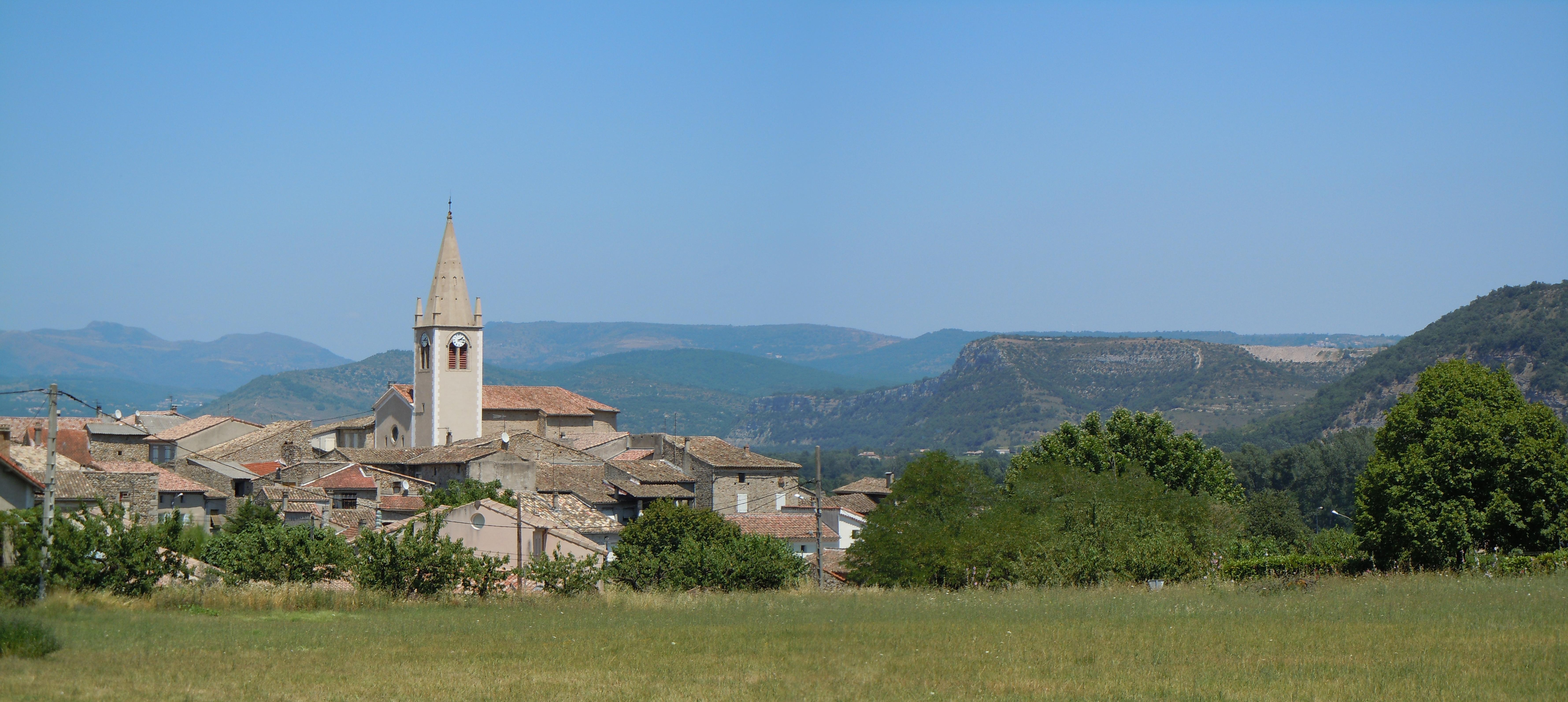 Saint-Sernin (Ardèche) - France